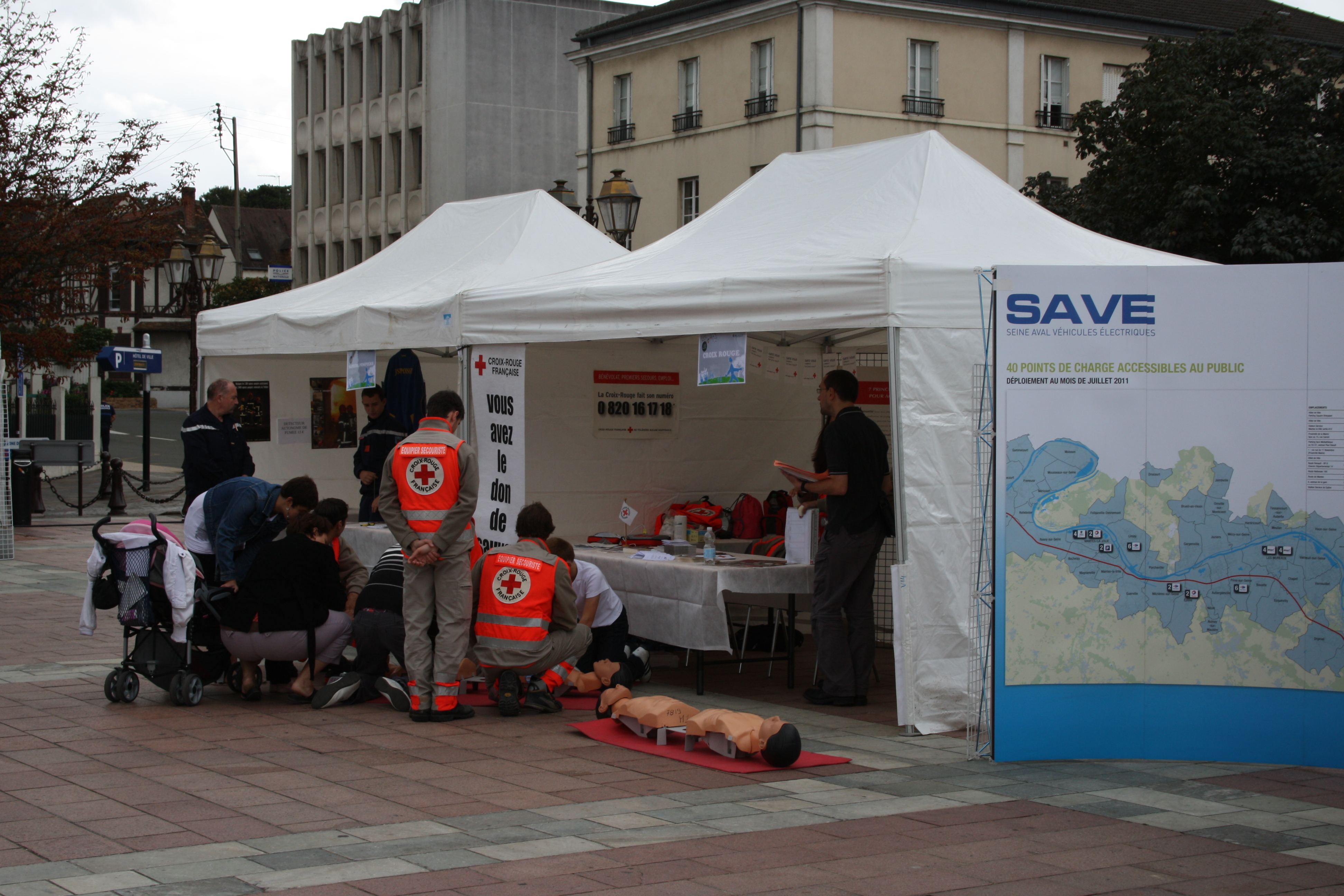 Initiation aux premiers secours par la Croix Rouge Française lors de la semaine de la mobilité et de la sécurité routière à Poissy en septembre 2011.